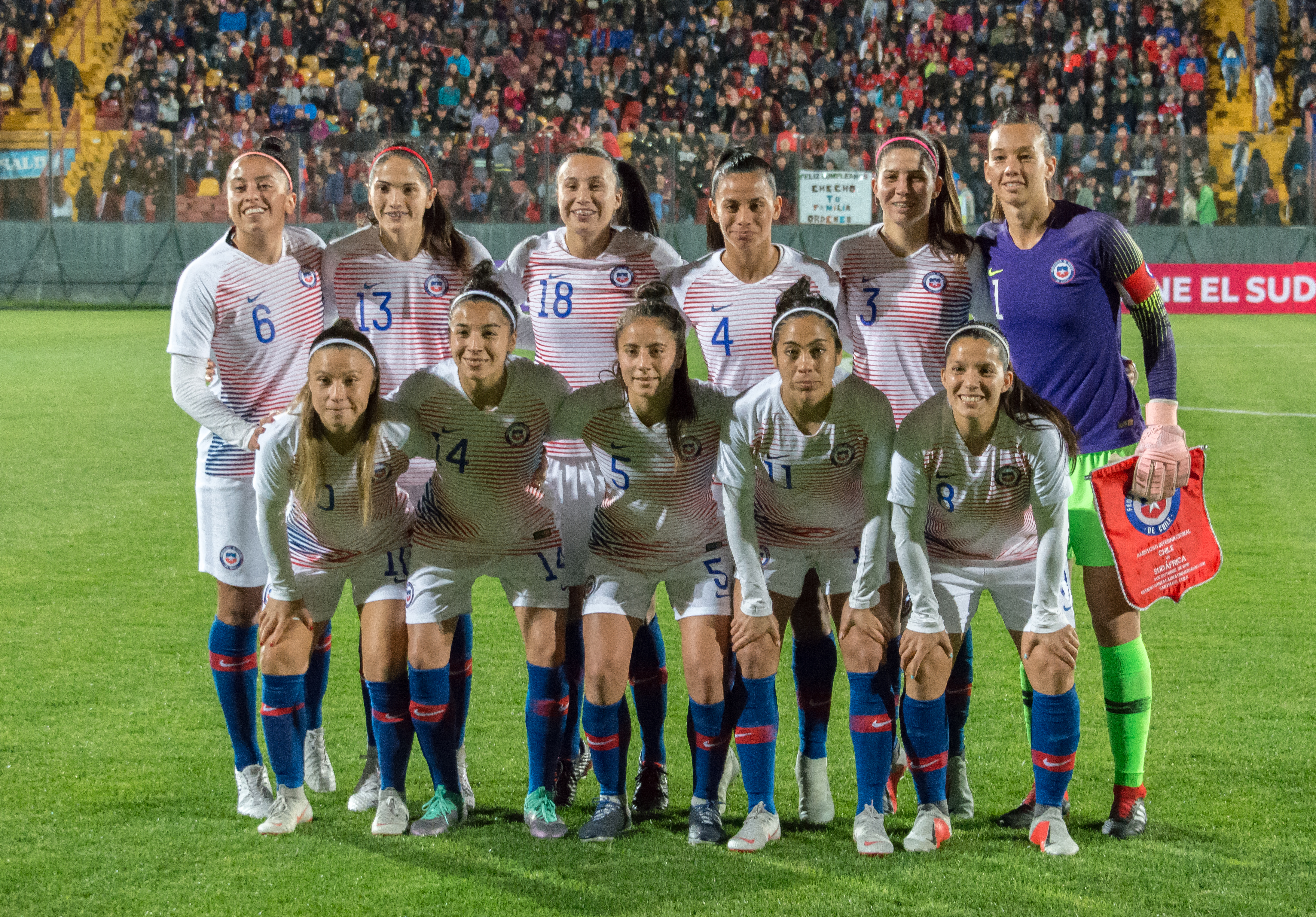 Formación de Chile, Chile v Sudáfrica, Estadio Santa Laura, Independencia, Santiago, Chile.